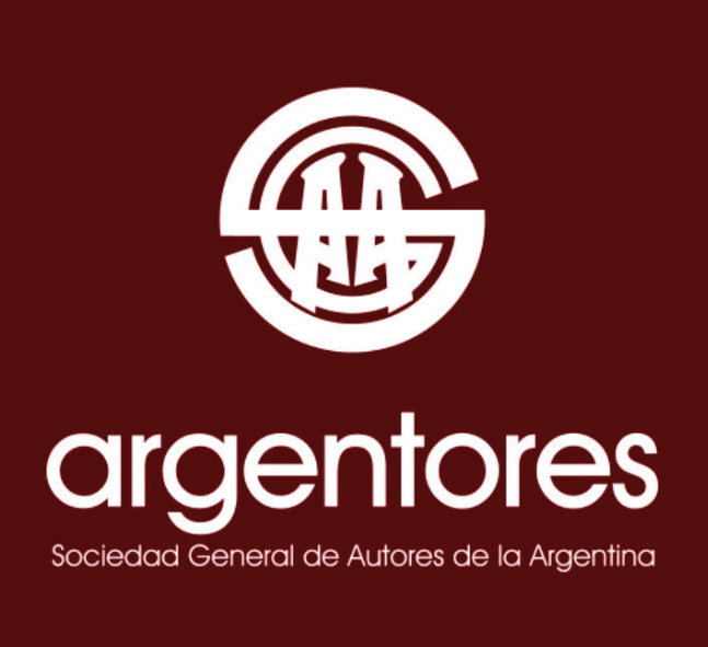 Logo Oficial Sociedad General de Autores de la Argentina (ARGENTORES)